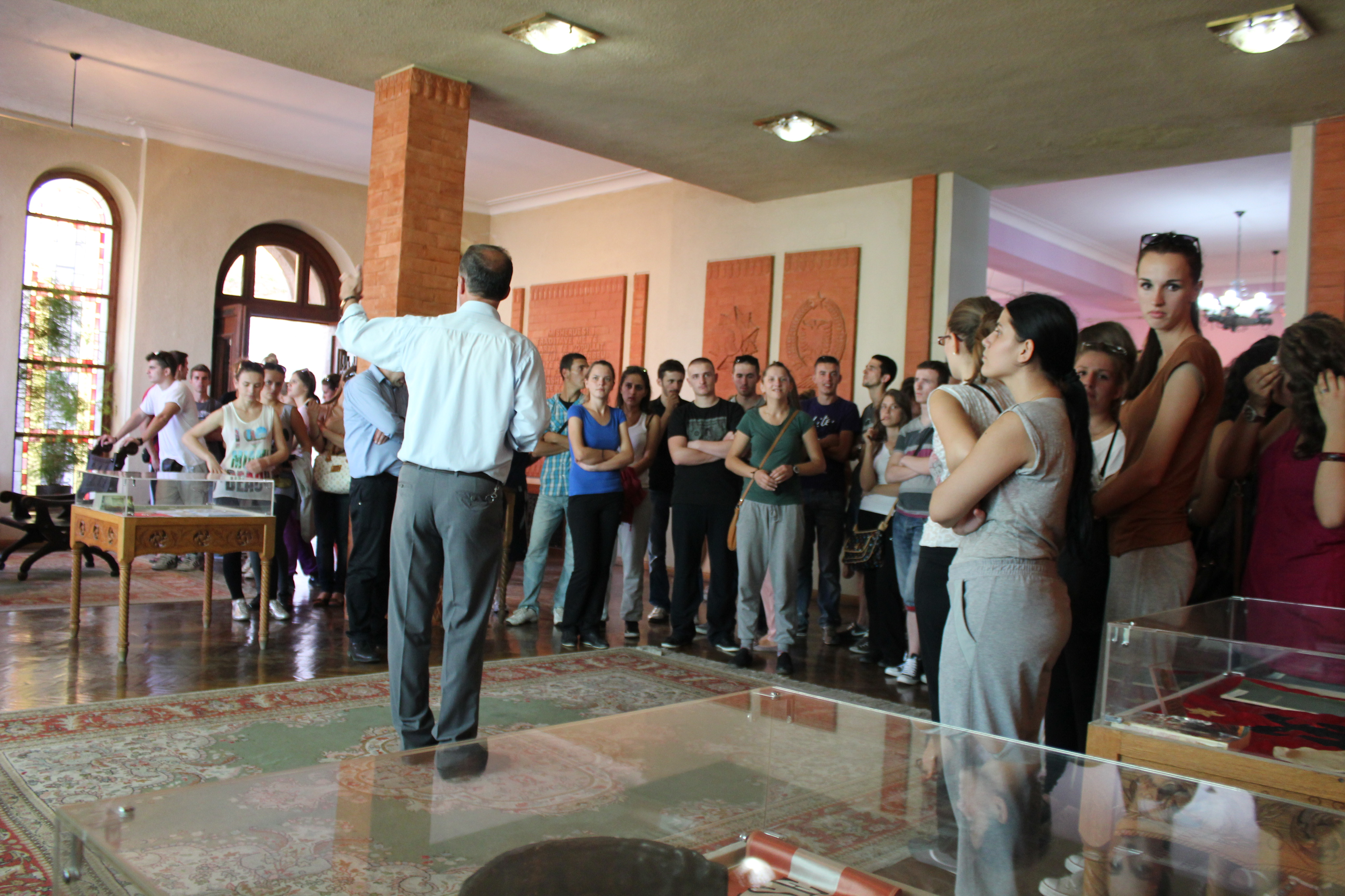 Kalaja e Krujes